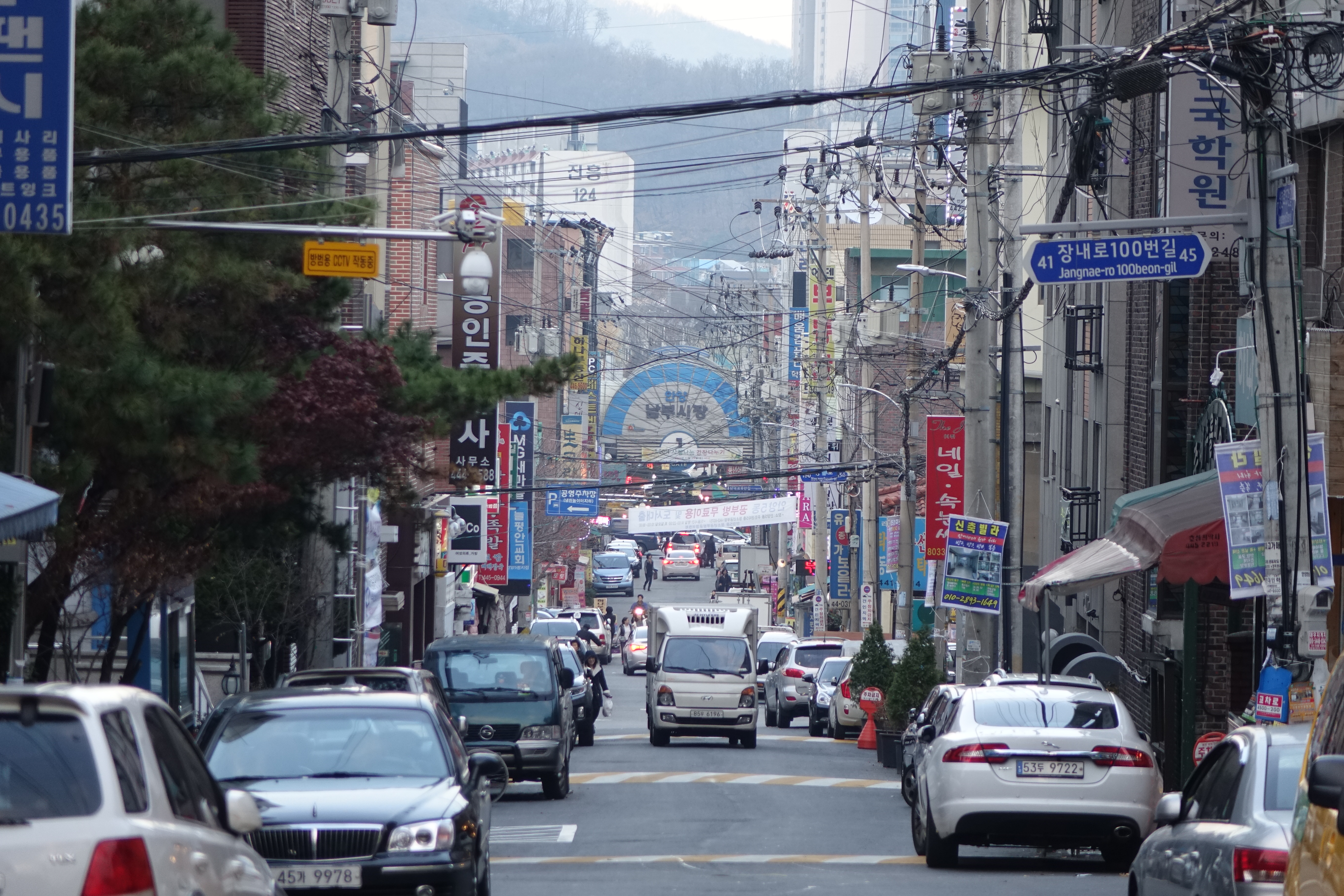 2014년 11월 경기도 안양시 안양대학교